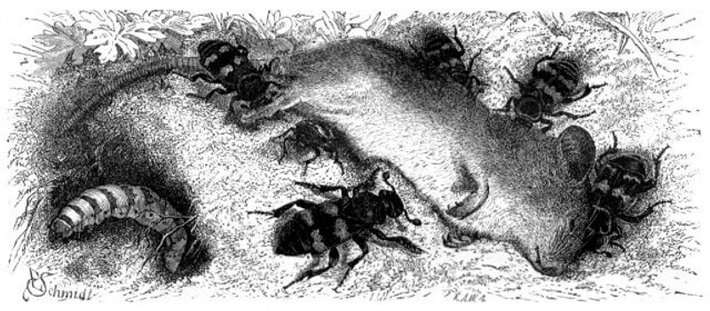 Nicrophorus vespillo (Totengräberkäfer)